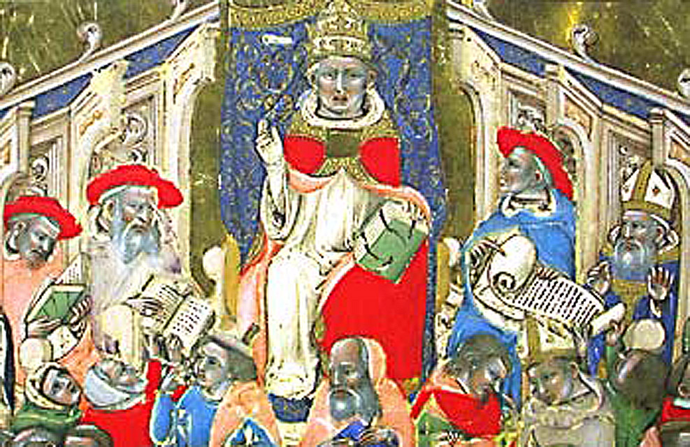 Clément V tient un consistoire à Avignon